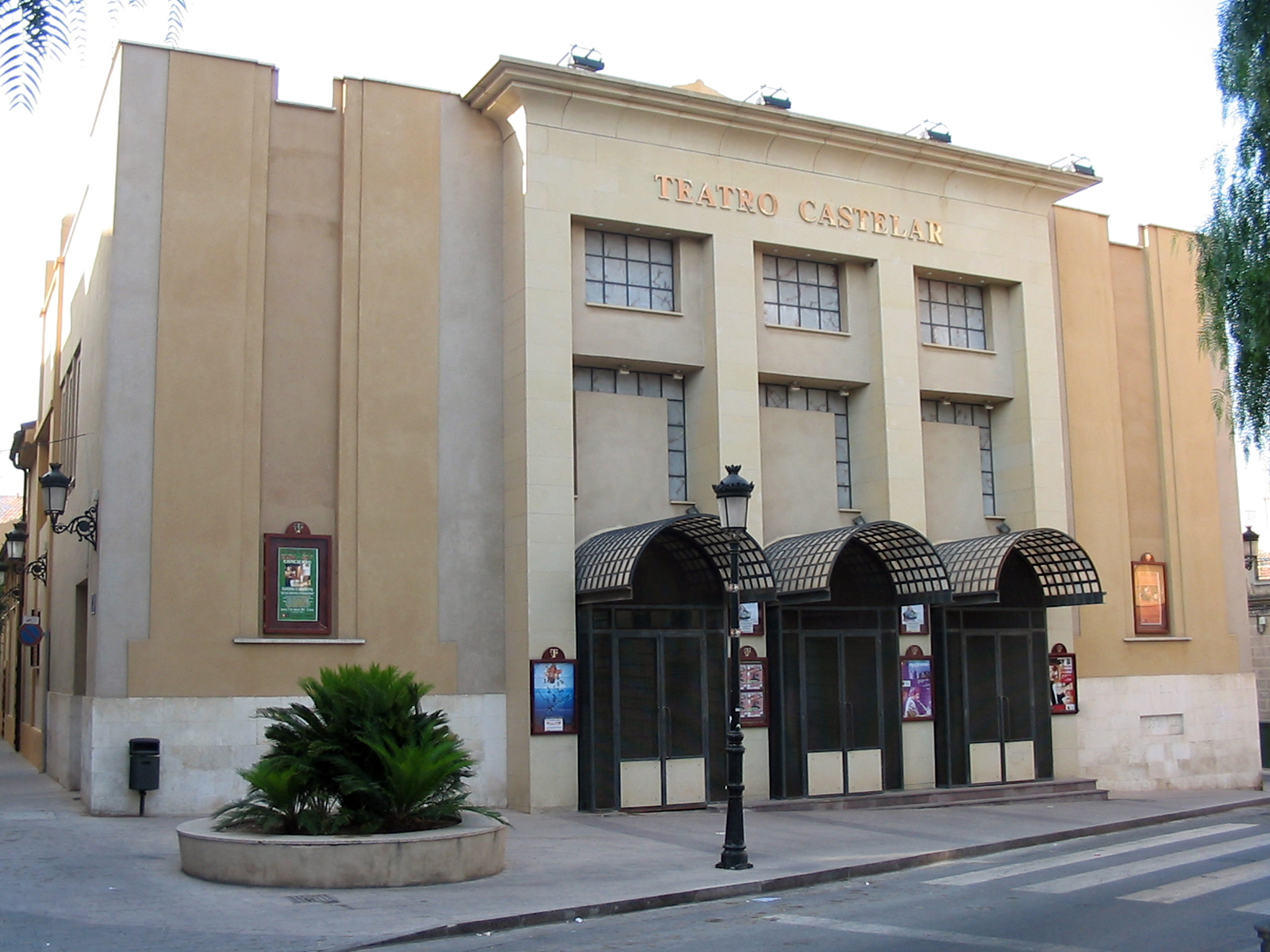 Fotografía del Teatro Castelar de Elda, Alicante, España.